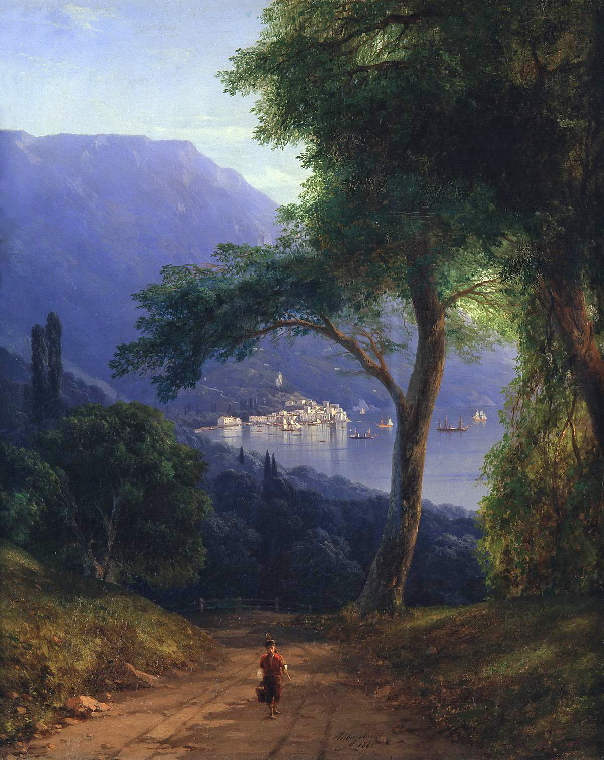 Холст, масло.